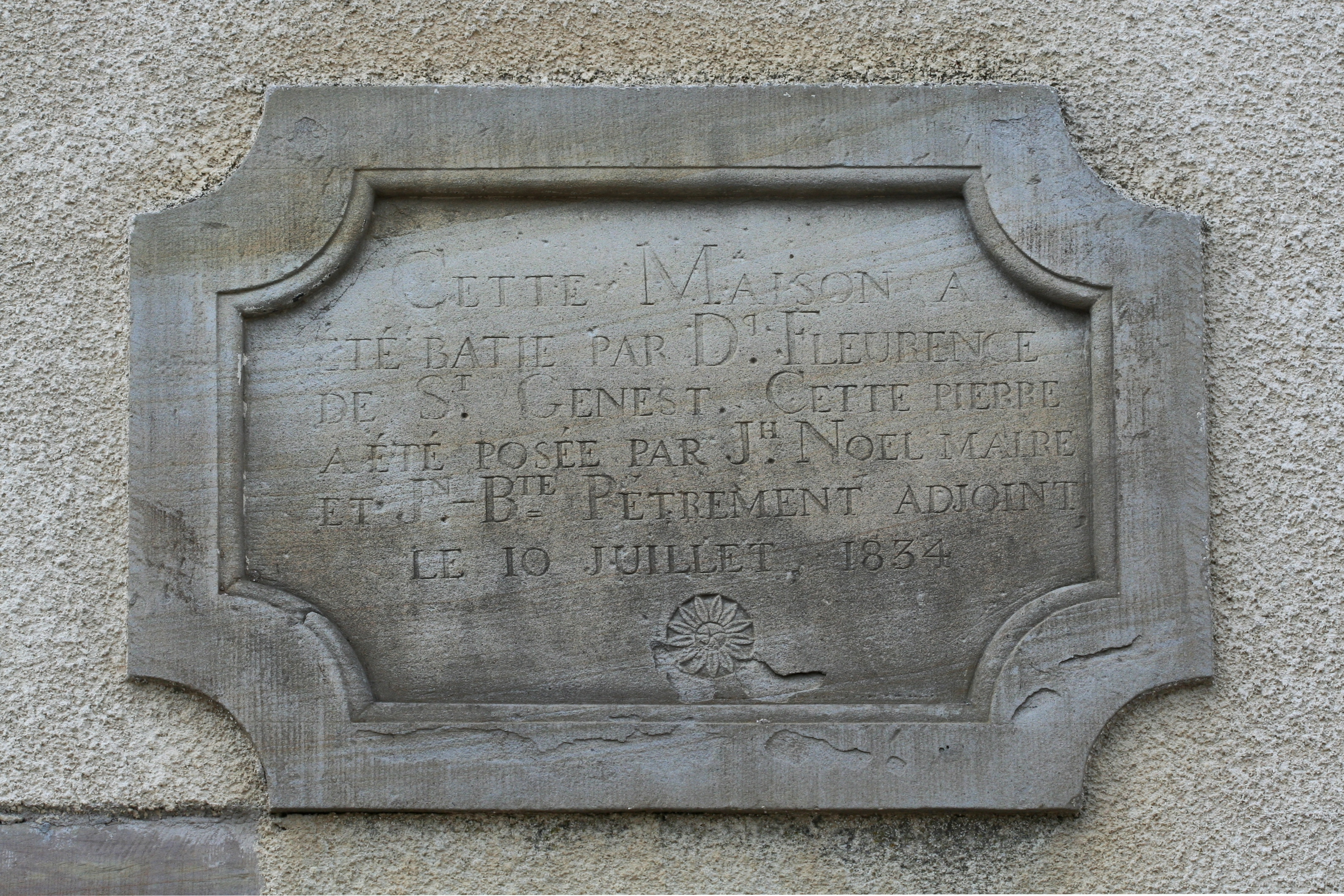 Plaque de la mairie de Saint-Genest (Vosges)